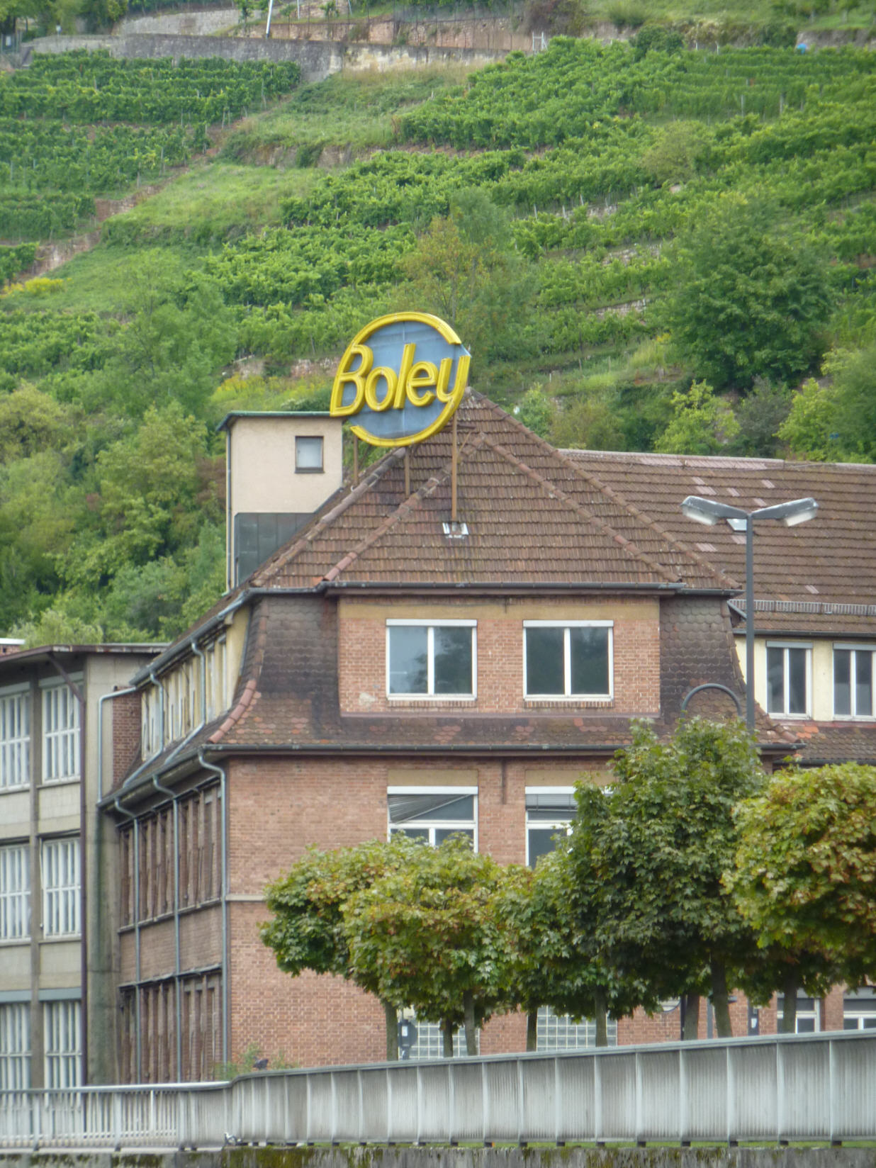 Boley, ehemals Boley & Leinen, Mettinger Str., Esslingen